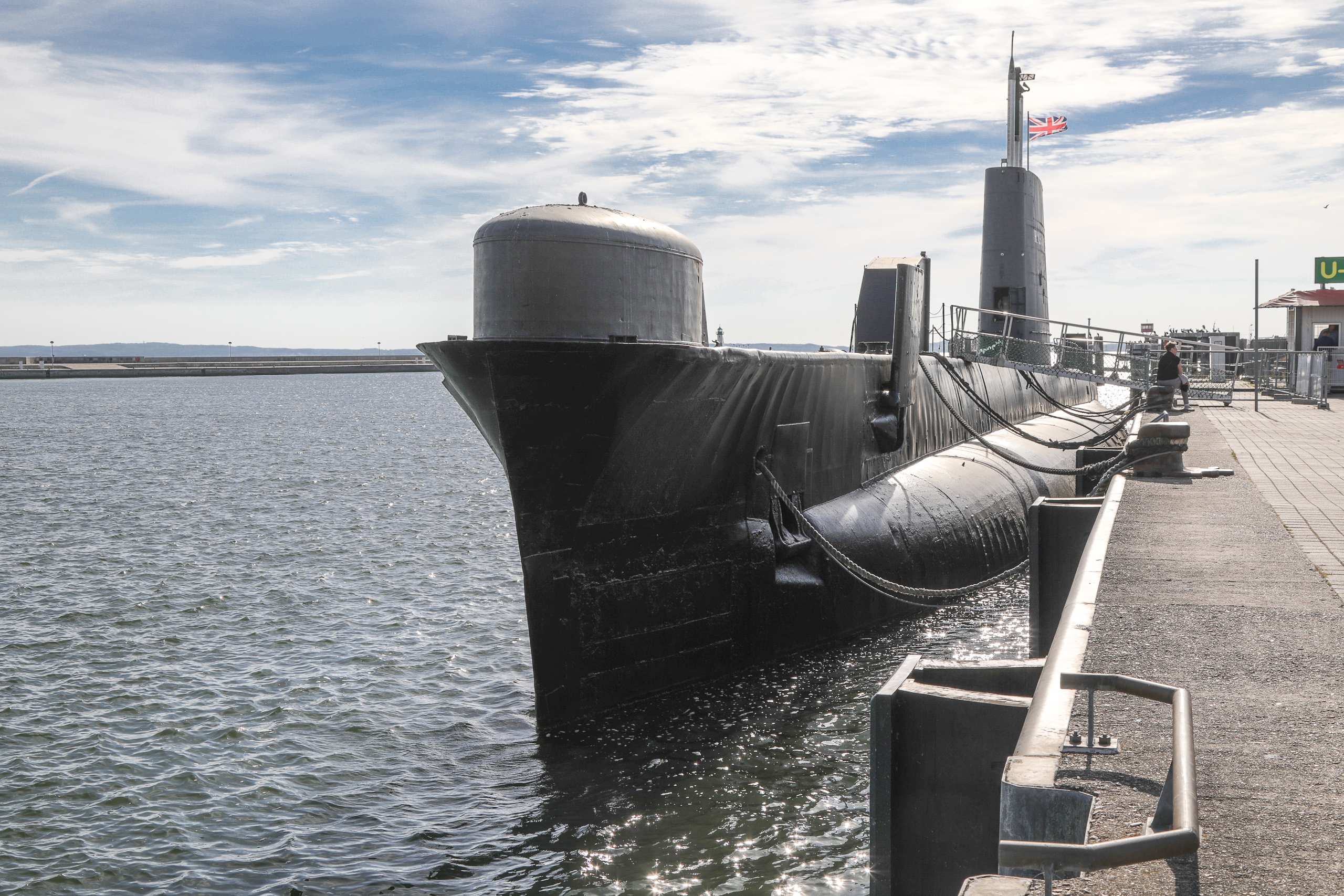 Schwarz lackiert ist die H.M.S Otus (S 18), ehemaliges dieselelektrisches U-Boot der Royal Navy und heute Museum im Sassnitzer Stadthafen.